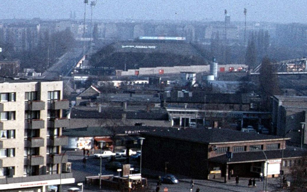 Das Stadion am Gesundbrunnen, auch Plumpe, genannt, (im Hintergrund) kurz vor seinem Abriss in 1974.